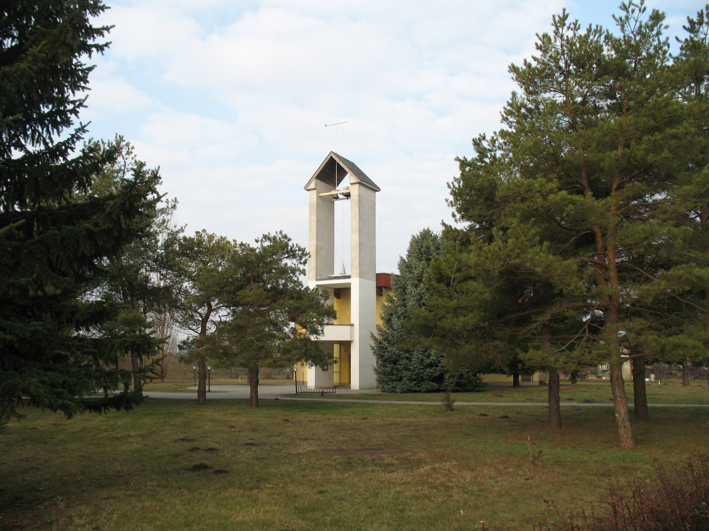 Nagyvölgy templom